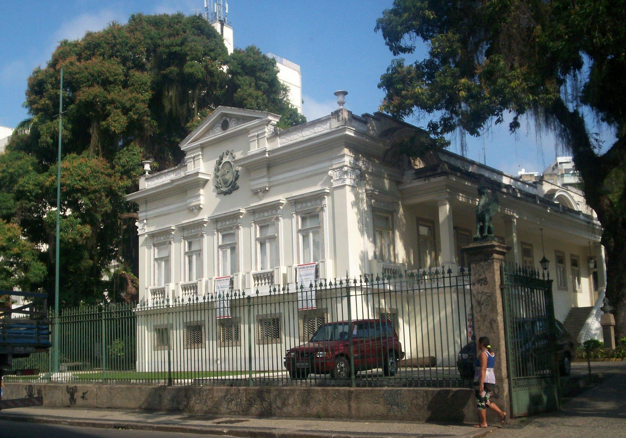 Palácio Nilo Peçanha, antigo palácio do Governador do Estado do Rio de Janeiro, atual sede do MHAERJ - Museu Histórico e Artístico do Estado do Rio de Janeiro.